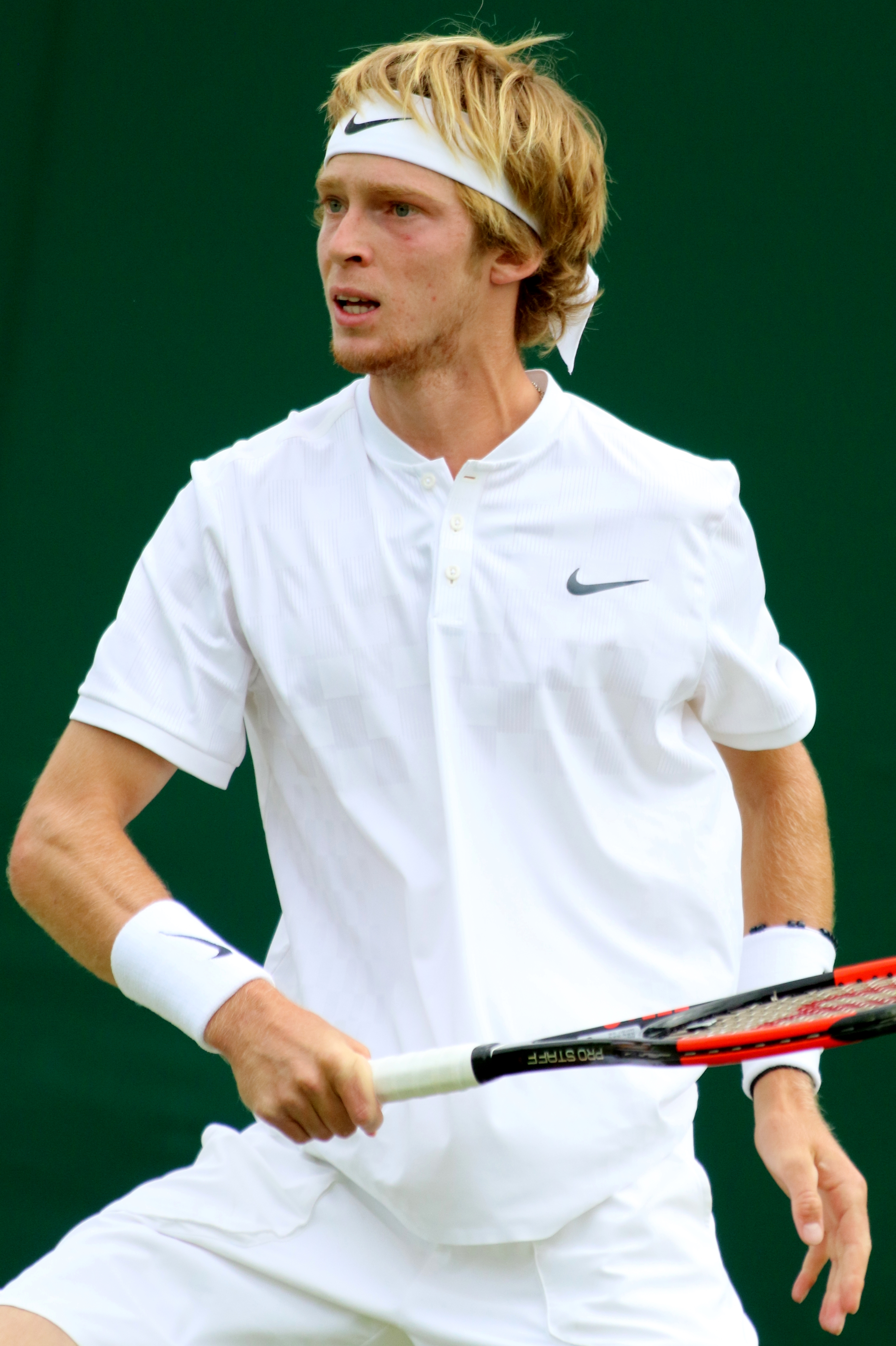 Rublev WM17 (17)